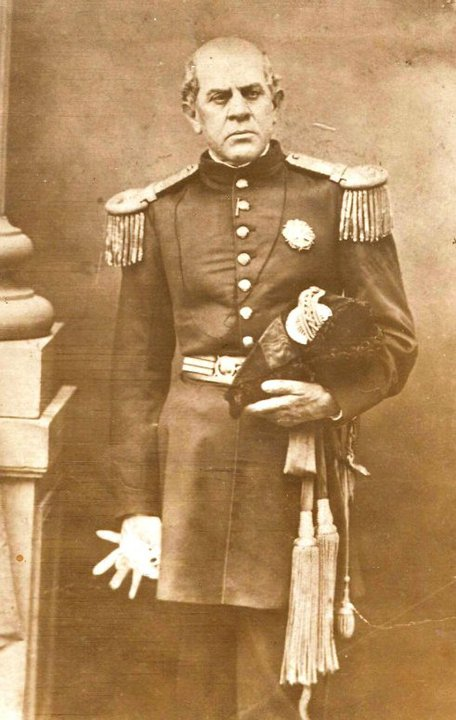 El Teniente Coronel Domingo F. Sarmiento, visitando la Exposición Universal de París en 1867. Futuro Presidente de la República Argentina.